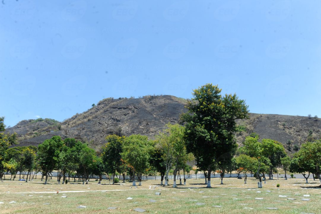 Rio de Janeiro - Área queimada no Parque Estadual da Pedra Branca, zona oeste da cidade (Tania Rego/Agência Brasil)